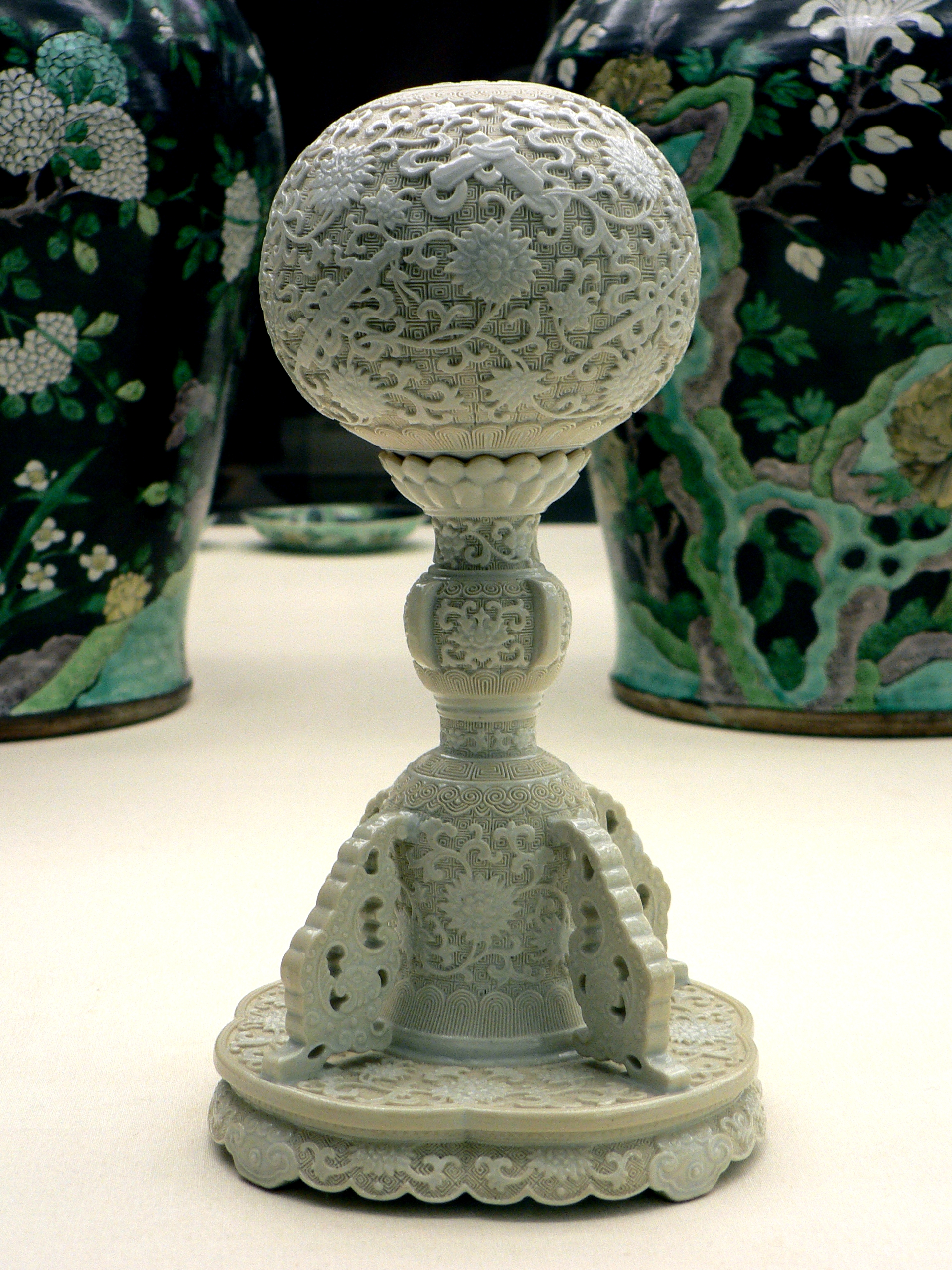 Porte-Chapeau en porcelaine blanche, Chine, milieu du XVIII, dinastie Qing, période Qianlong, photographié à la Fondation Calouste Gulbenkian à Lisbonne, Portugal